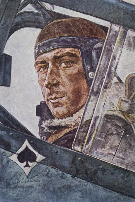 Wolfgang Willrich: Oberstleutnant Mölders einer unserer erfolgreichsten Jagdflieger [Zeichnung] Verlag: Volksbund für das Deutschtum im Ausland, W. II. Berlin W 30